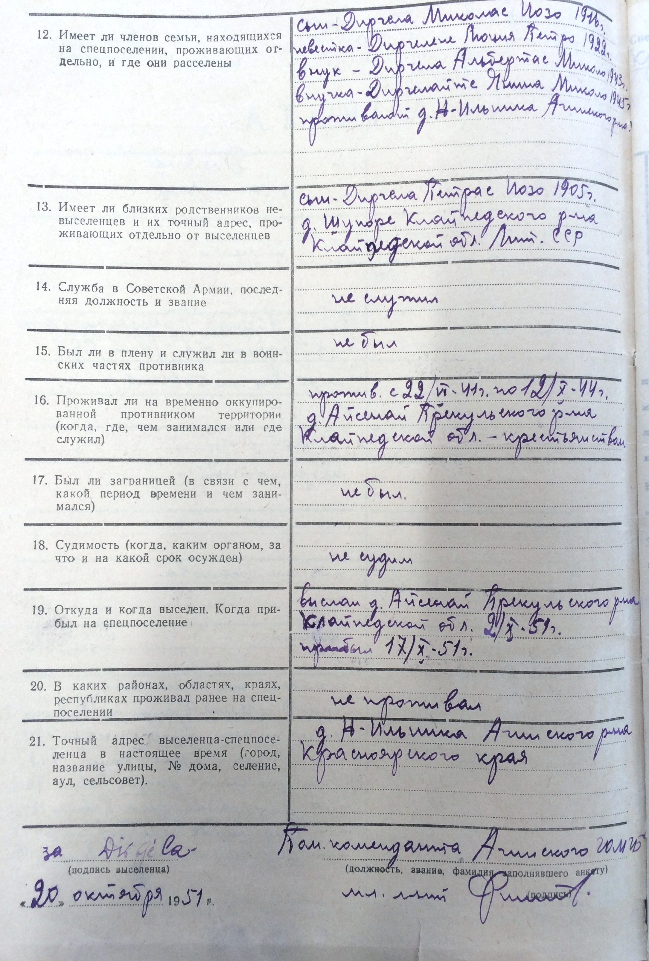 1951 m. ištremto tremtinio anketos, sudarytos atvykus į tremties vietą, dalis.